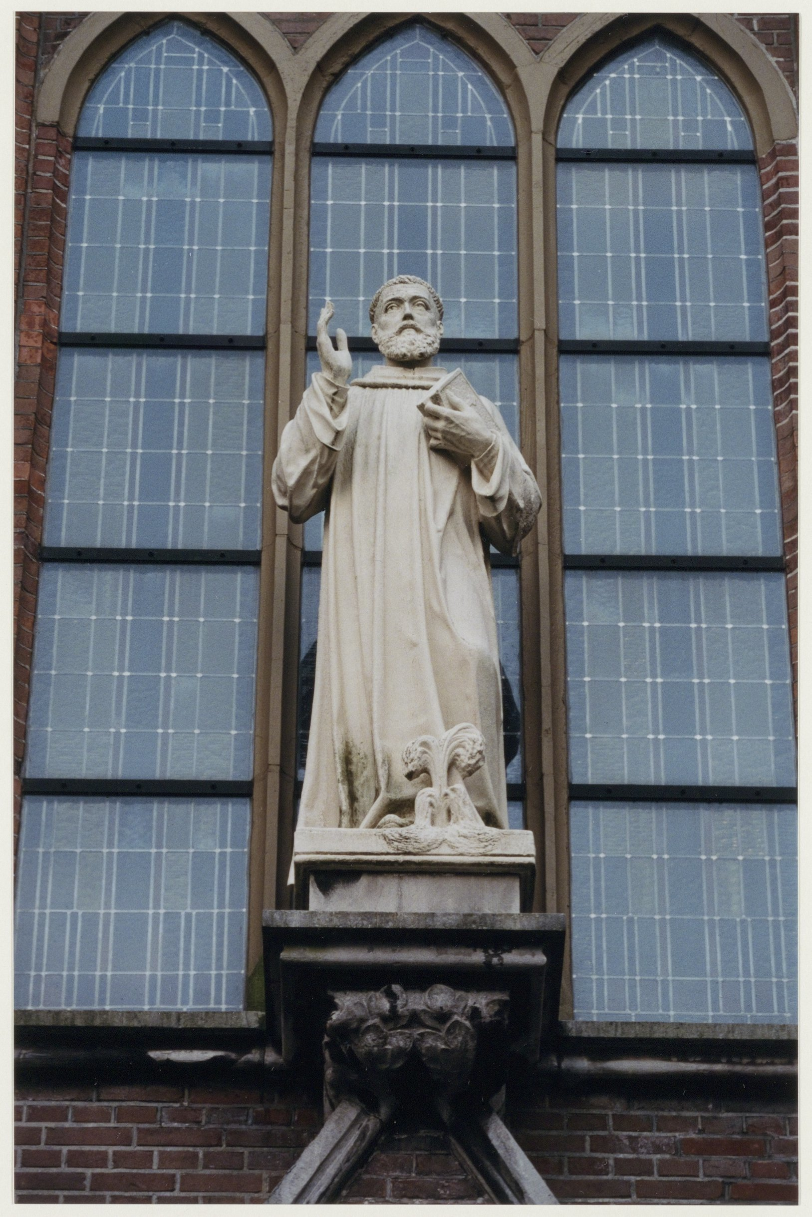 CollectieCollectie Fotoburo de BoerInventarisnummerNL-HlmNHA_54050106NL-HlmNHA_1478_45110KBeschrijvingBeeld van Engelmundus boven de hoofdingang van de Engelmunduskerk in Driehuis.FotonummerNL-HlmNHA_1478_6480DocumenttypeTopografische prenten, tekeningen en foto'sVervaardigerNederstigt, Rick (UP de Boer) Soort vervaardigerFotograaf AnnotatiesIJC.090198LandNederland ProvincieNoord-Holland GemeenteVelsen PlaatsDriehuis StraatDriehuizerkerkweg Begindatum01-1998Einddatum01-1998TechniekFoto TrefwoordenKerken, Beeldende Kunsten